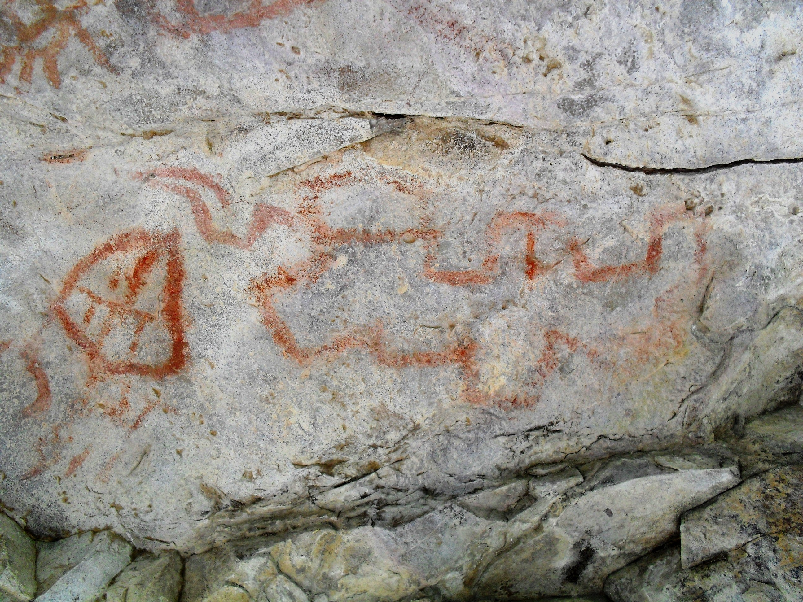 Formas lineales en el Yacimiento Rupestre de Sáchica, en color Rojo